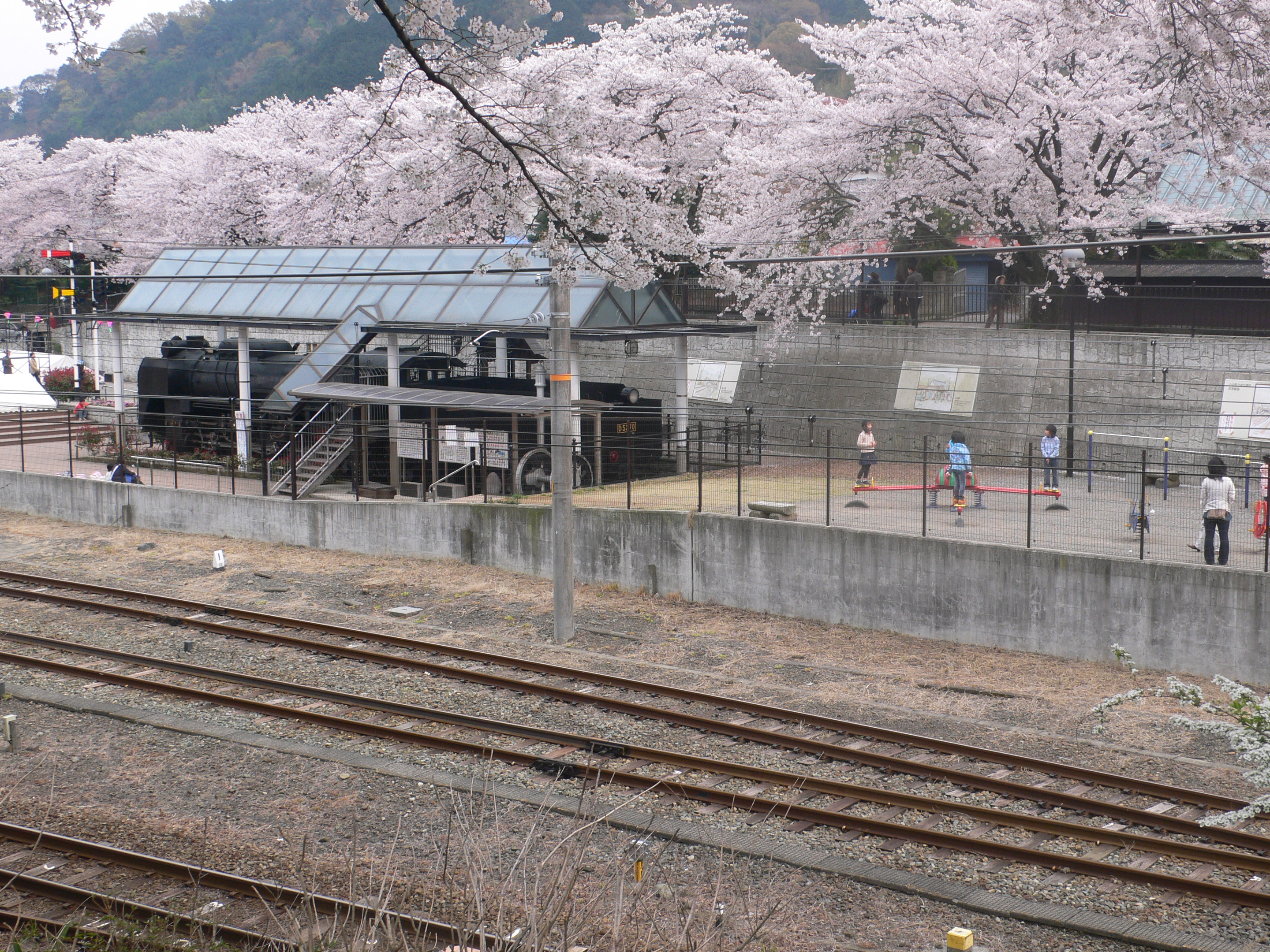 山北町鉄道公園の全景